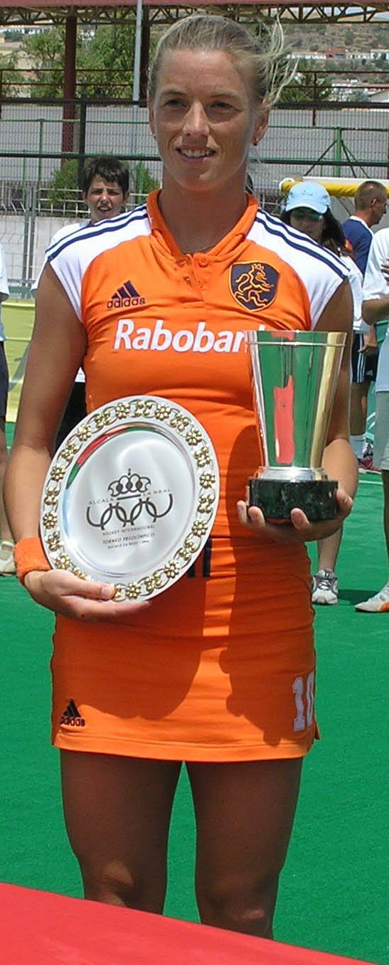 Mijntje Donners, voormalig aanvoerder Nederlands team.